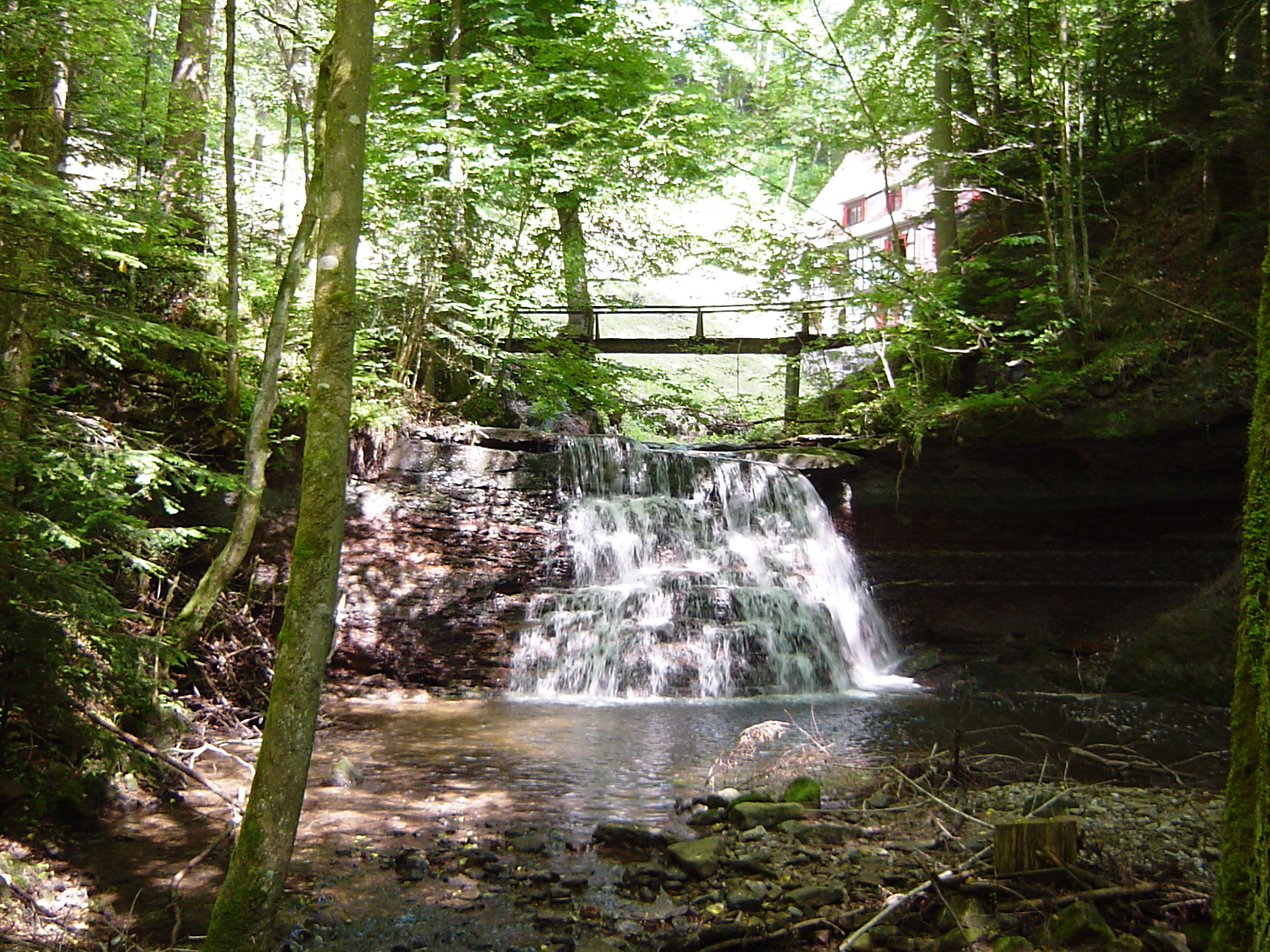 Wieslauf-Wasserfall bei der Klingenmühle